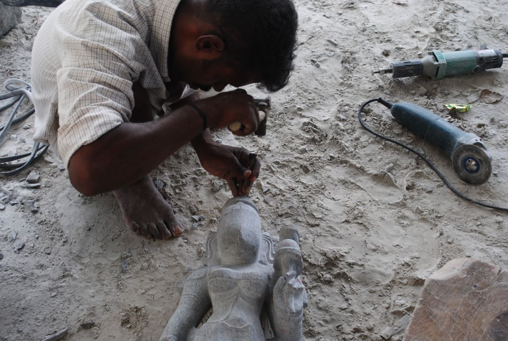 போளூர் வட்டம் மொடையூரில் உள்ள சிற்பக்கலைஞர்களின் படைப்புகள்